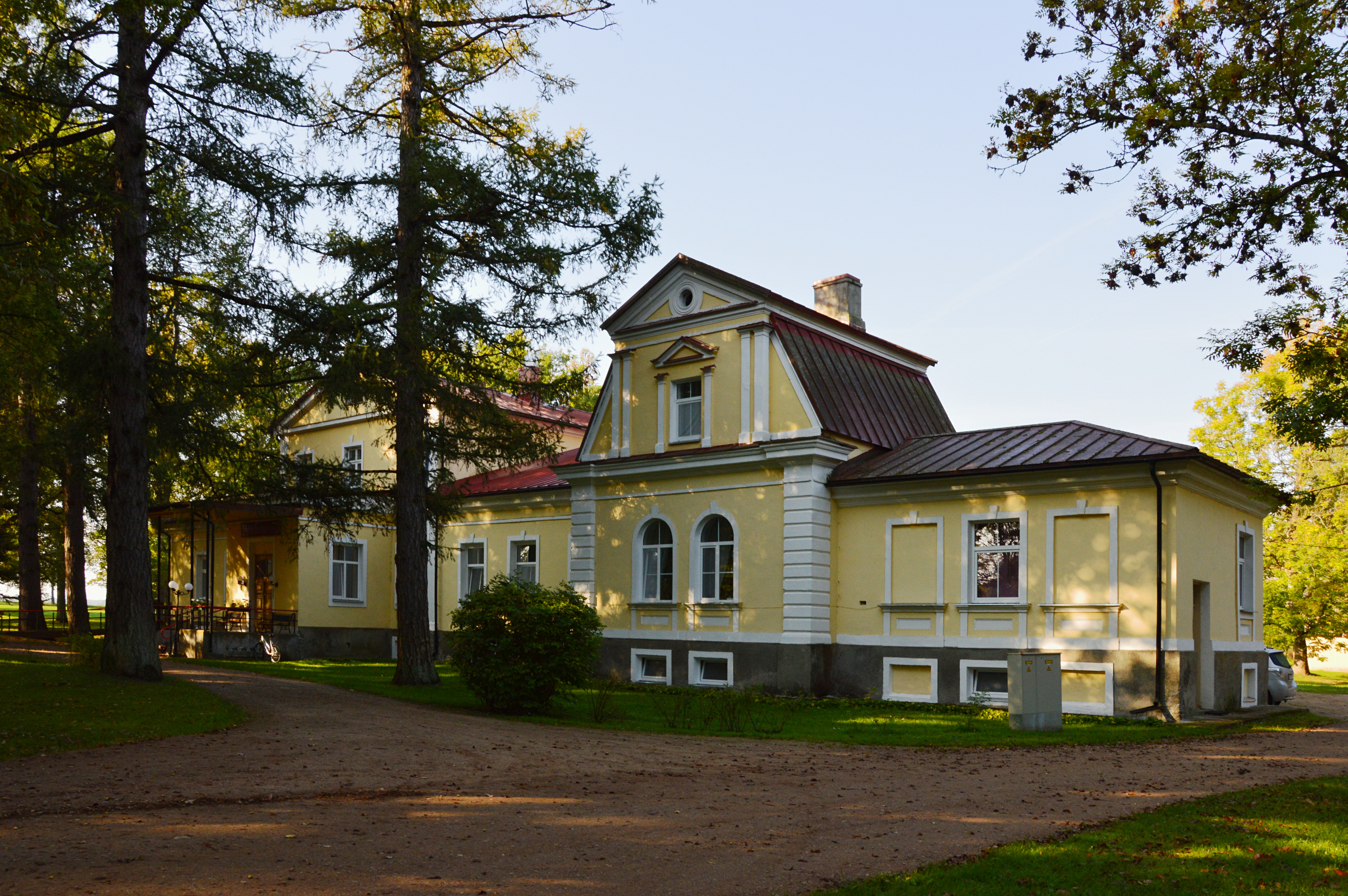 Kastre mõisa härrastemaja